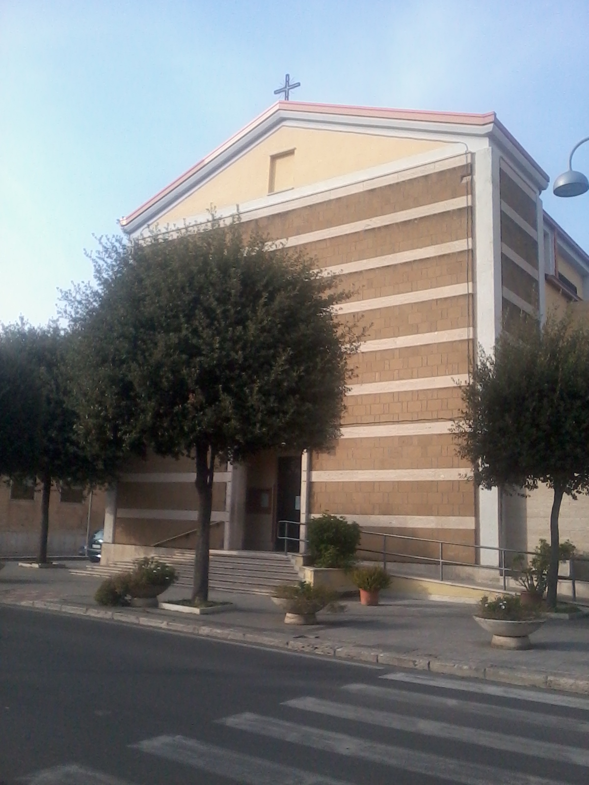 La chiesa di San Francesco a Cisterna di Latina